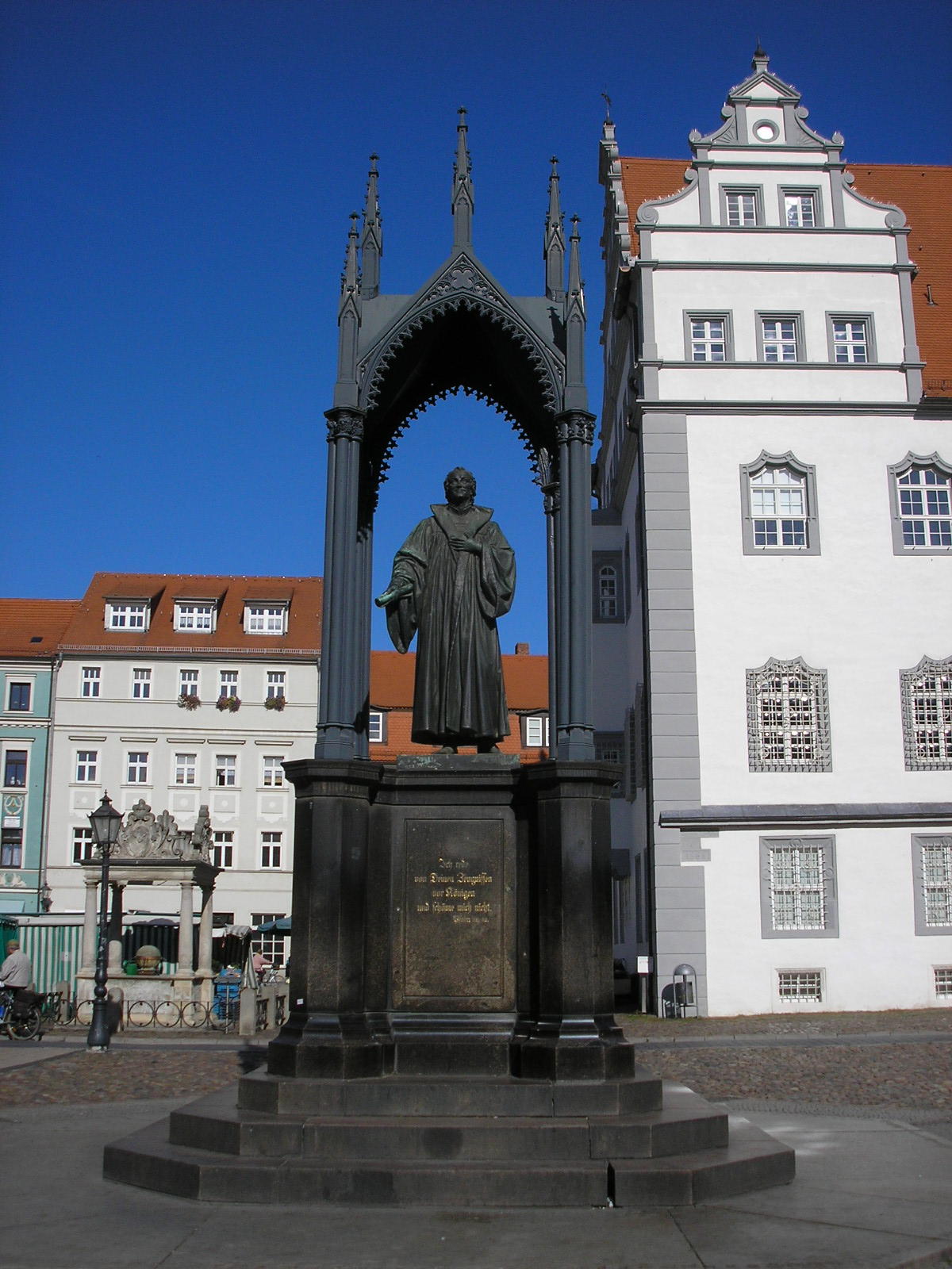 Melanchton-Denkmal auf dem Wittenberger Marktplatz.